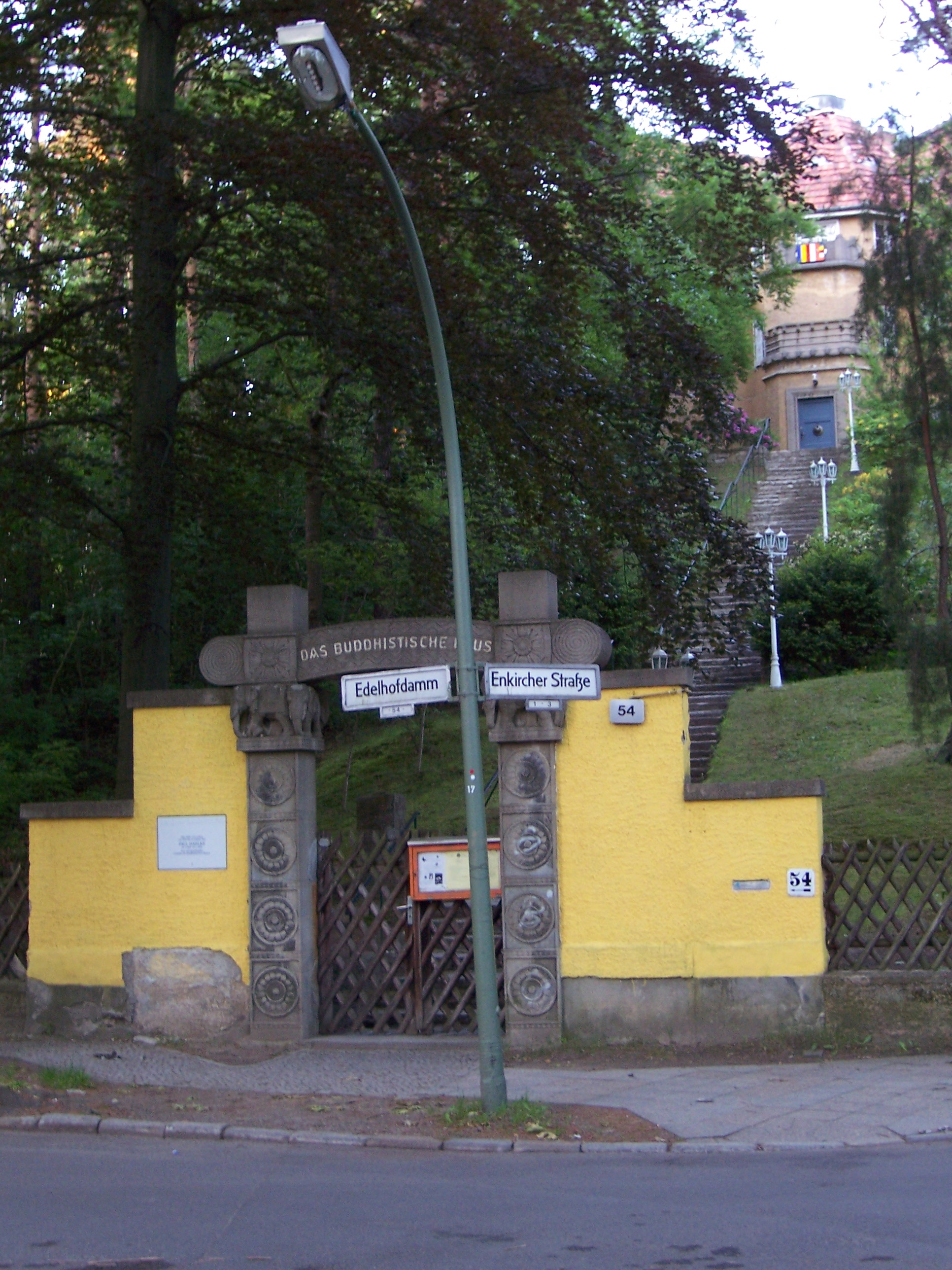 Buddhistisches Haus Berlin-Frohnau (Buddhist House Berlin)